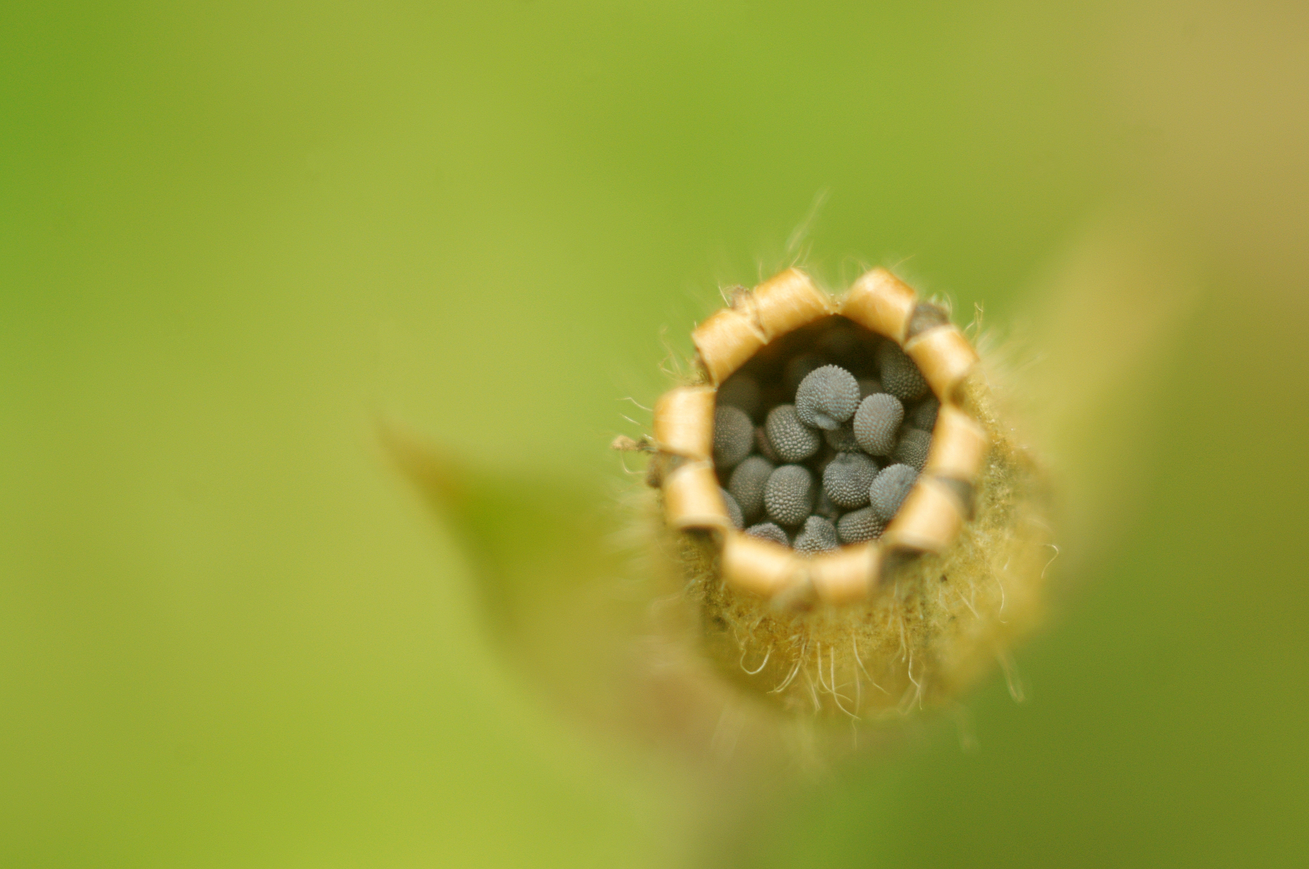 Punase pusurohu kupar seemnetega Pärispea külas Hauaneemel